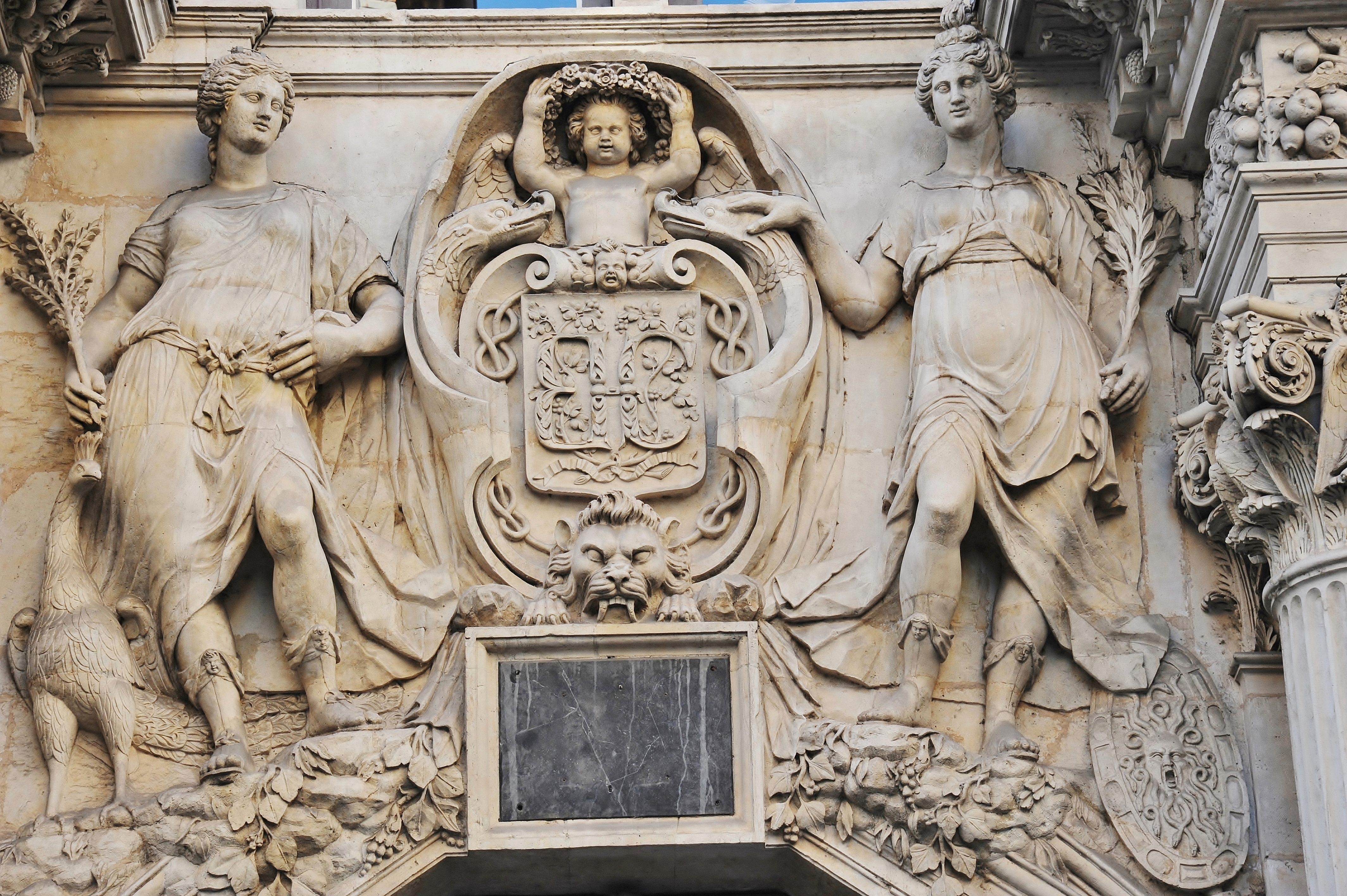 Façade Hôtel de Pierre / Toulouse